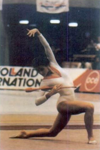 Susana Mendizábal en el Campeonato Europeo de Gimnasia Rítmica de Ámsterdam en 1980.